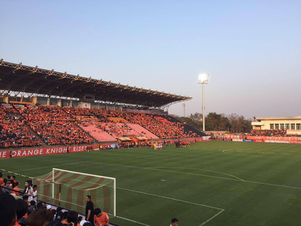 シンハー・スタジアム